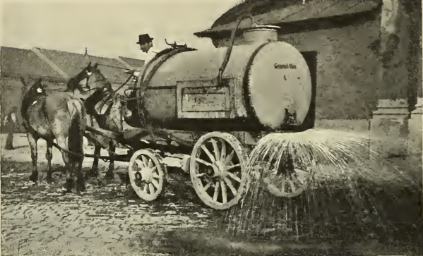 Wien - Straße. Details siehe Dateiname.